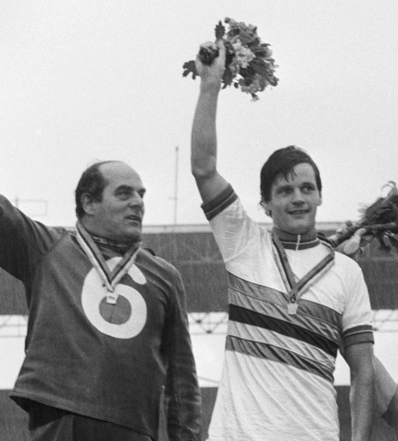 Martin Venix and his pacer Noppie Koch (left) at the World Championship 1979